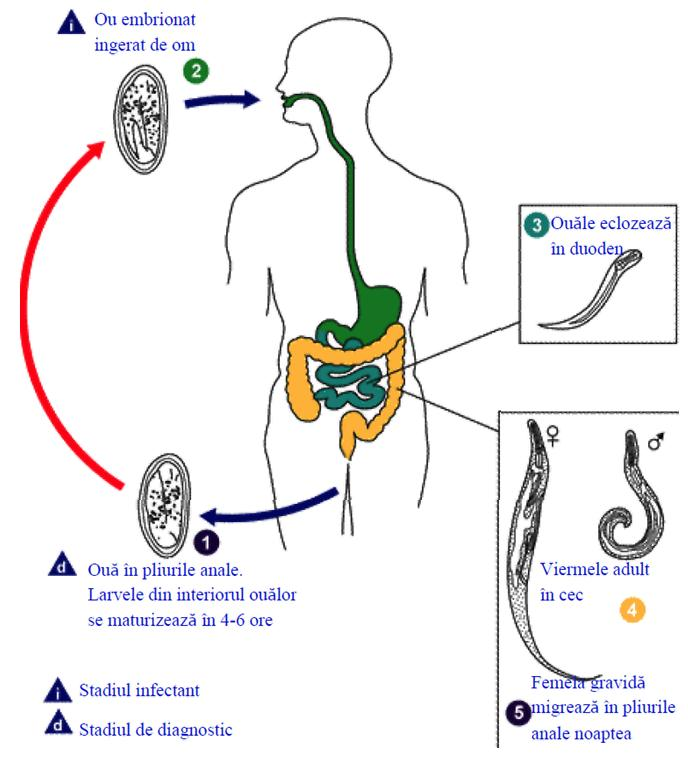 Ciclul de viata a oxiurului